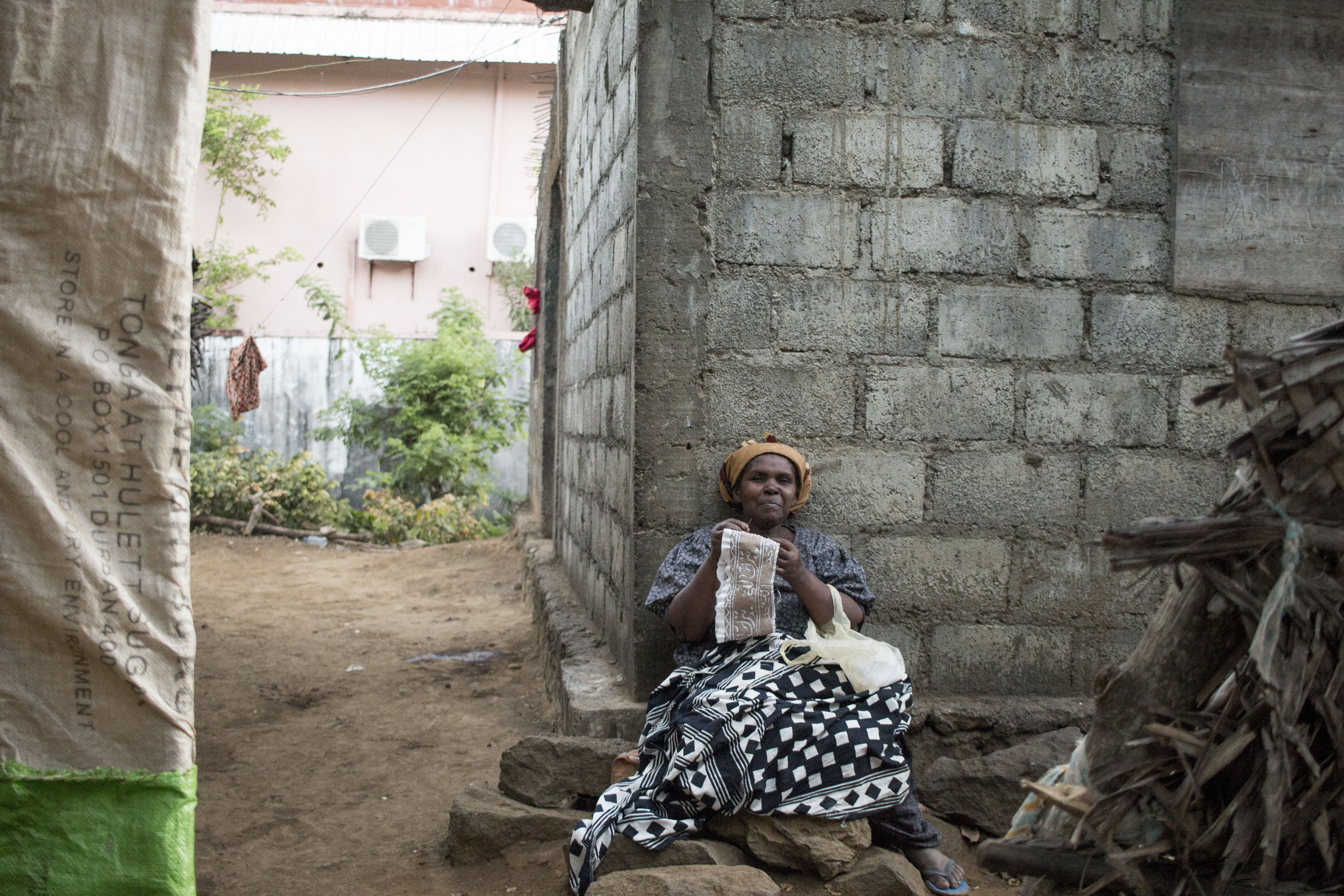 Eine Frau näht eine Kofia - der Hut der hier viel (vor allem für den Moscheebesuch) getragen wird This is an image of "African people at work" from Comoros